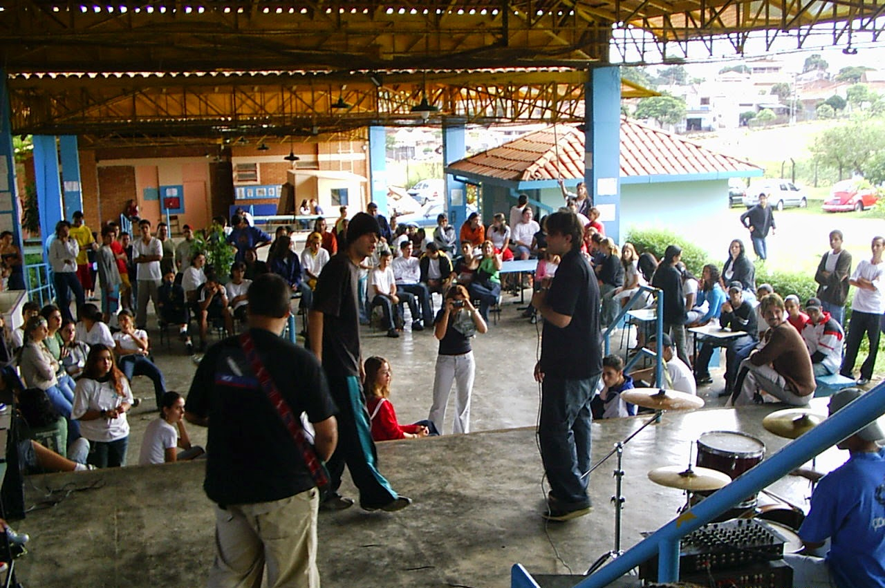 Gincana de Confraternização CEMEP - Aniversário de 14 anos da escola - Paulínia/SP